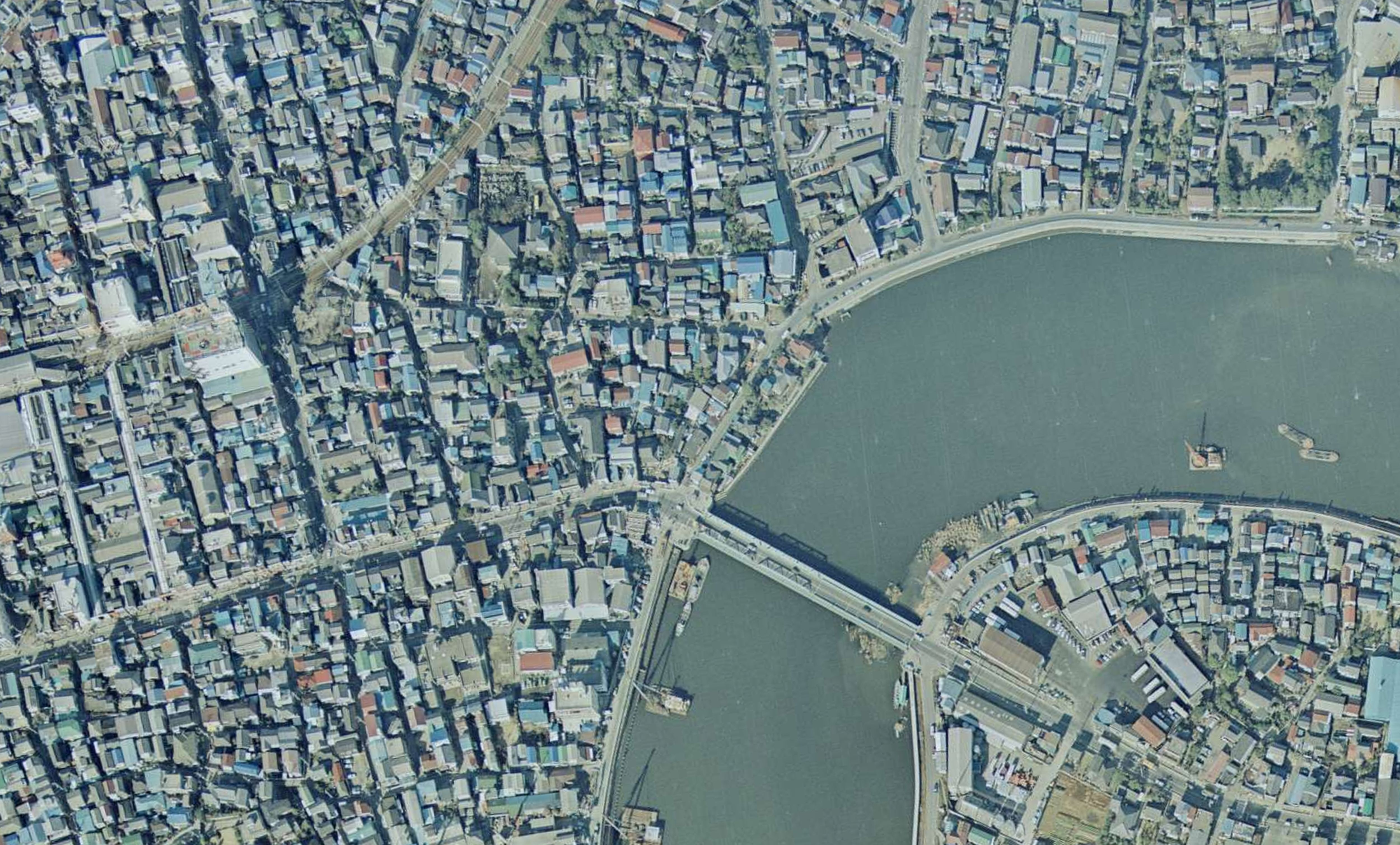 東京都葛飾区にあった本奥戸橋（旧橋）の1975年の空中写真。